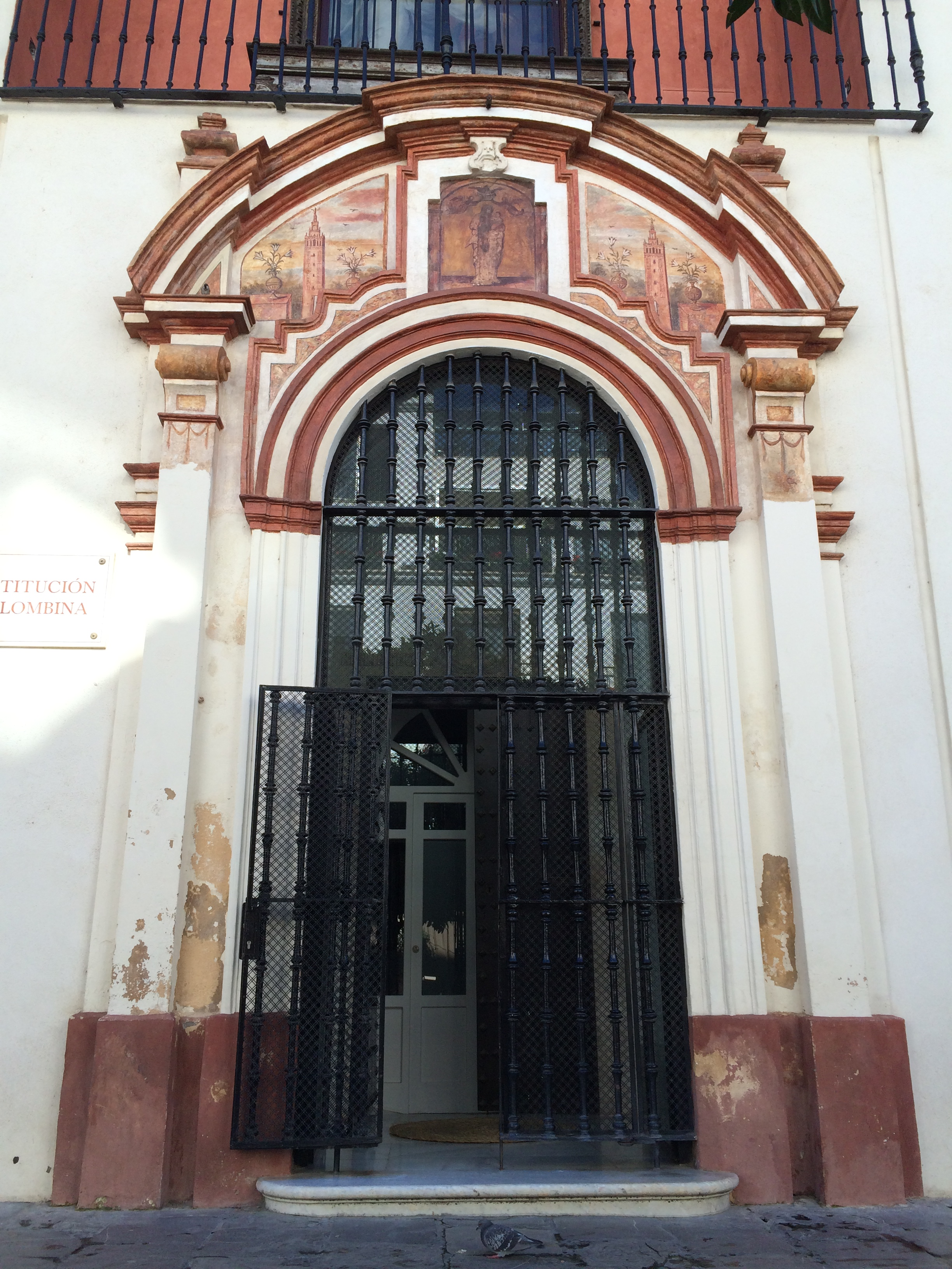 Puerta de la Institución Colombina. Fachada norte de la Catedral de Sevilla.